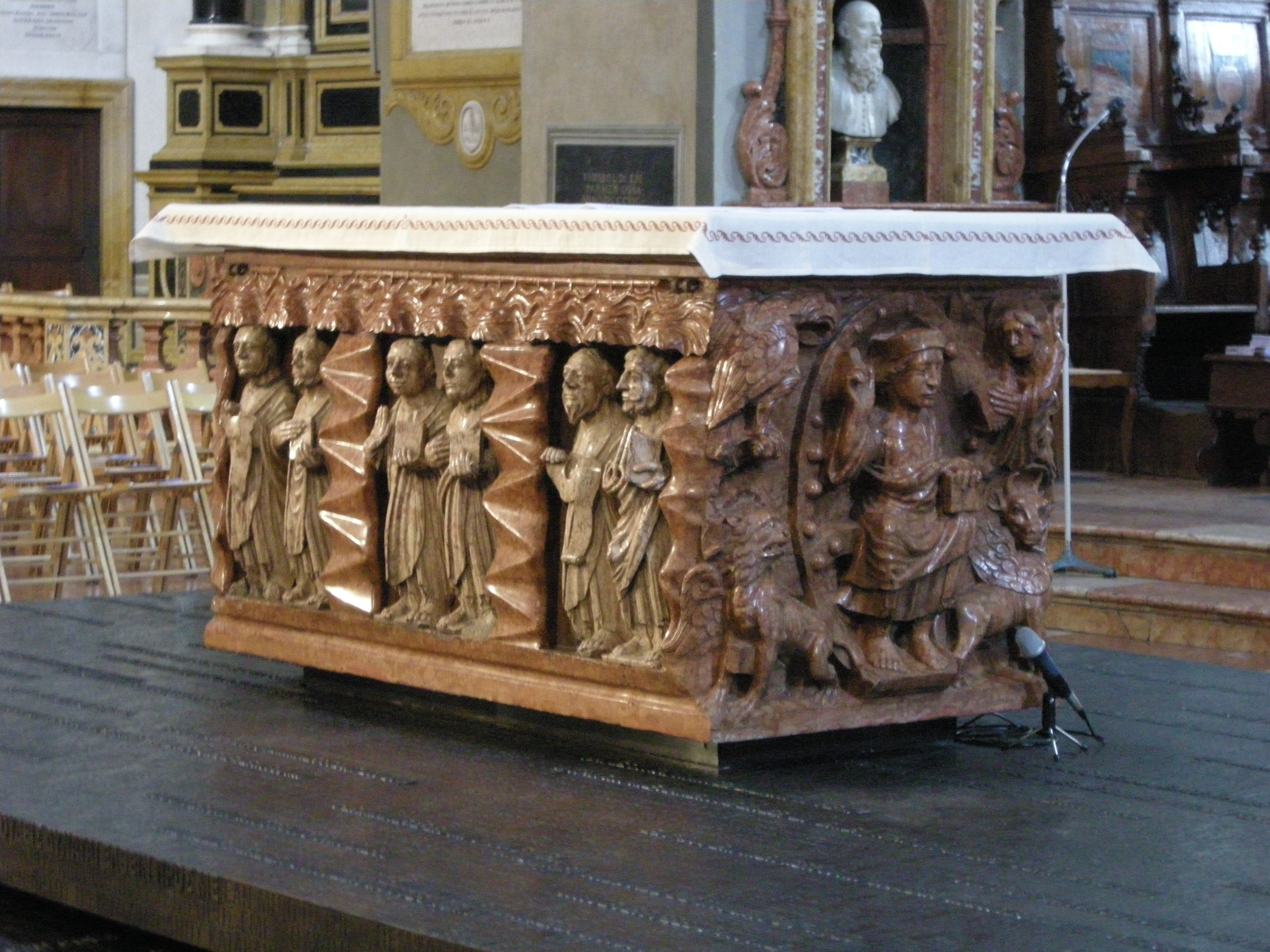 Duomo di parma, altare